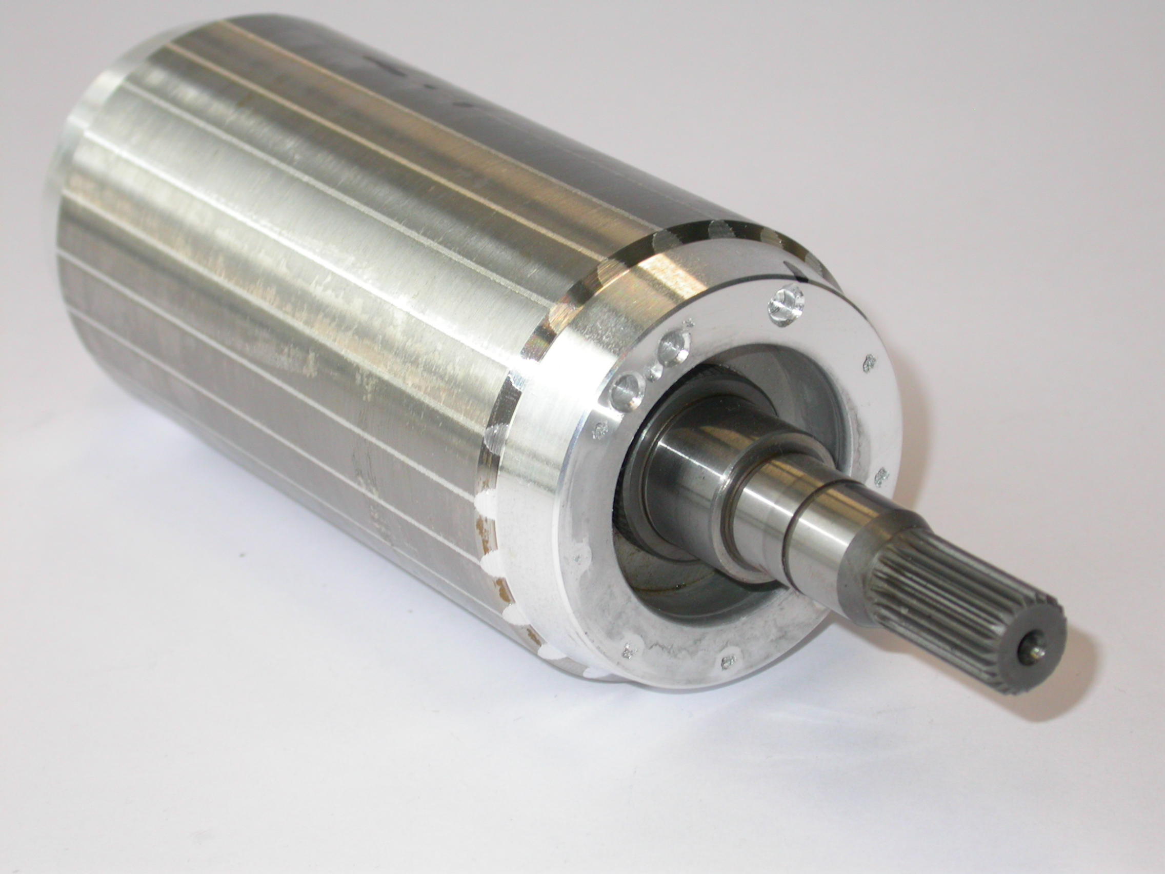 Gewuchteter Rotor eines Elektromotos